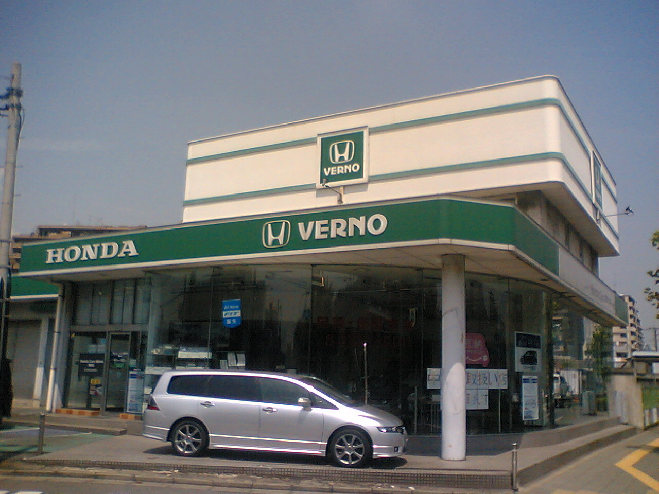 2008年撮影